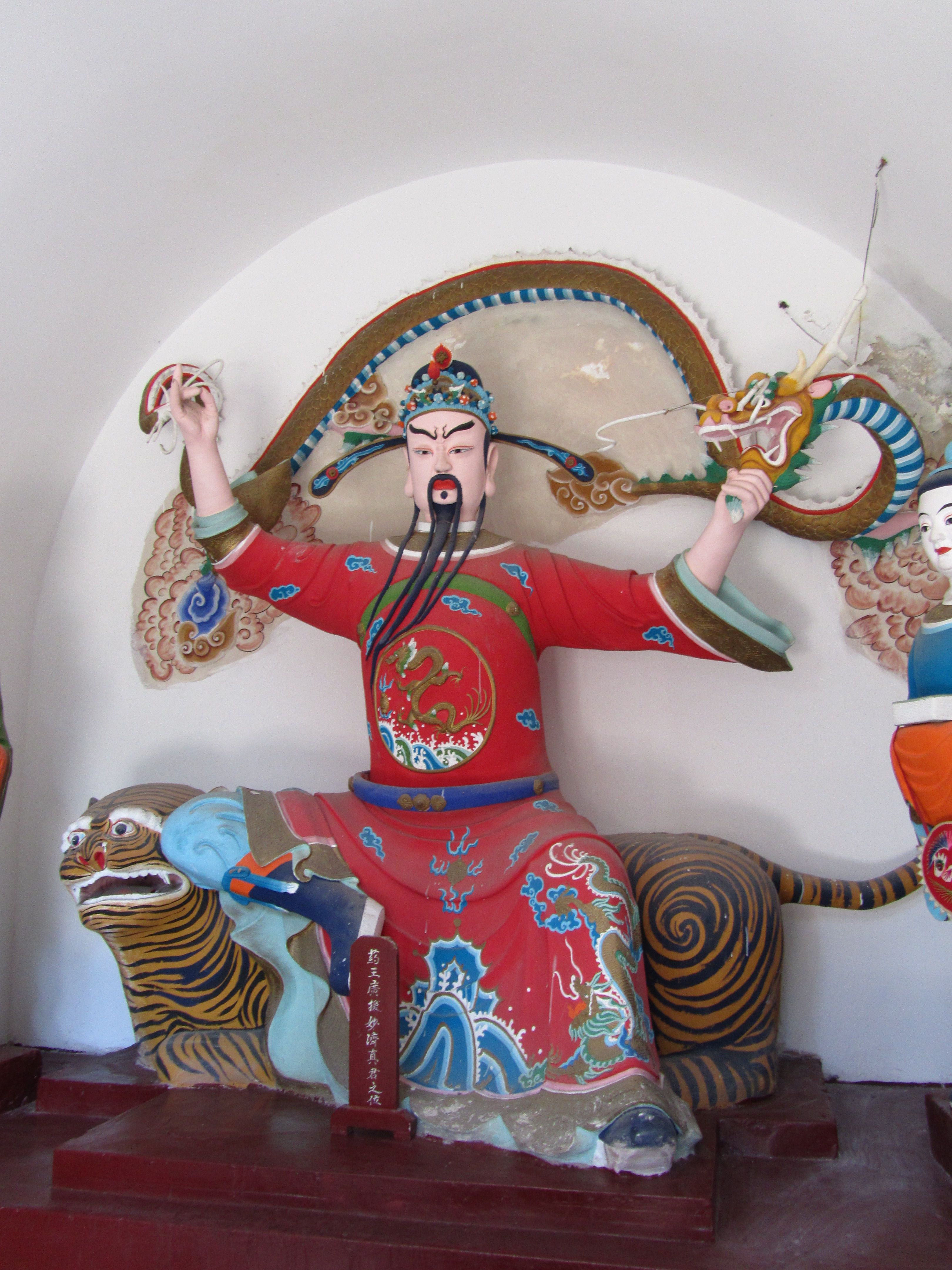 宝鸡金台观内的药王像，牌位为“药王广援妙济真君之位”。